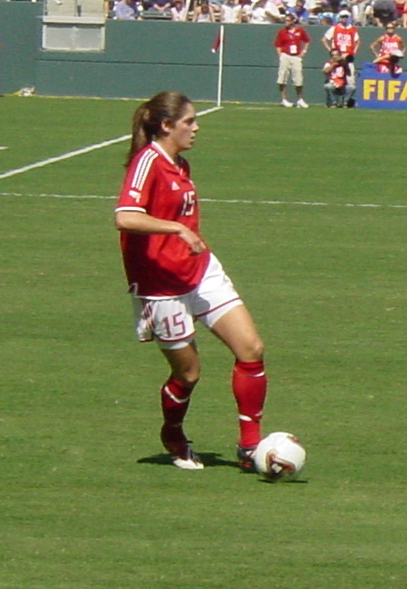 USA vs. Canada